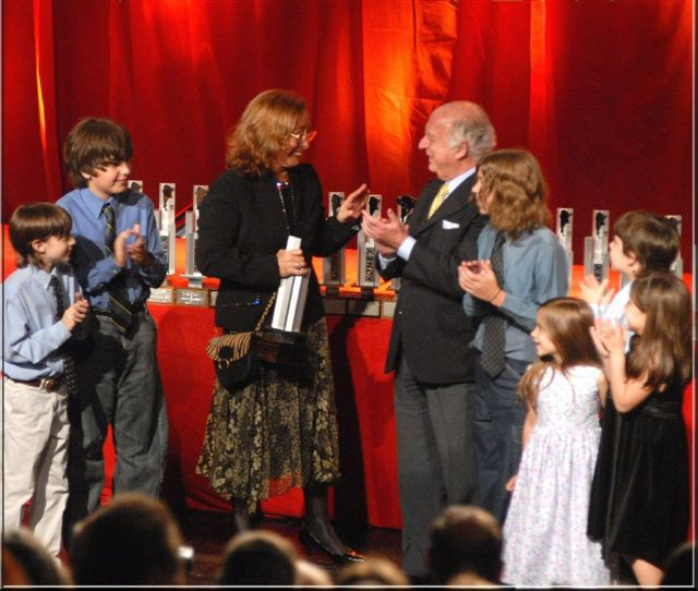 Silvia Bleichmar recibiendo el Konex de Platino con los nietos